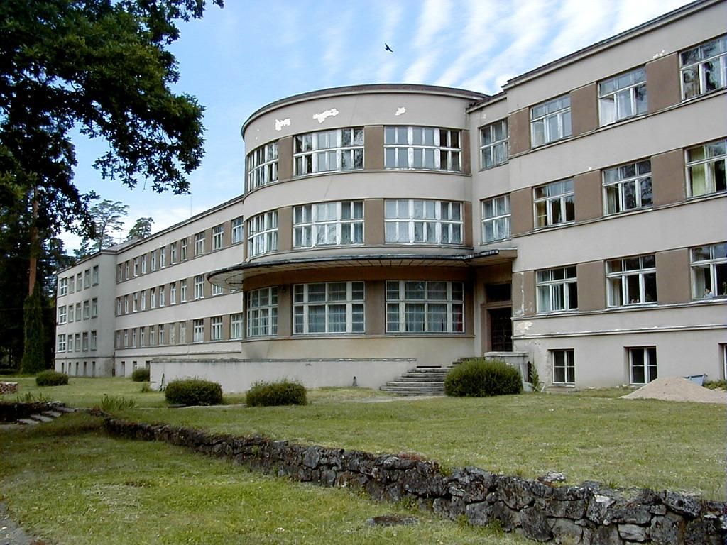 Tērvetes sanatorija